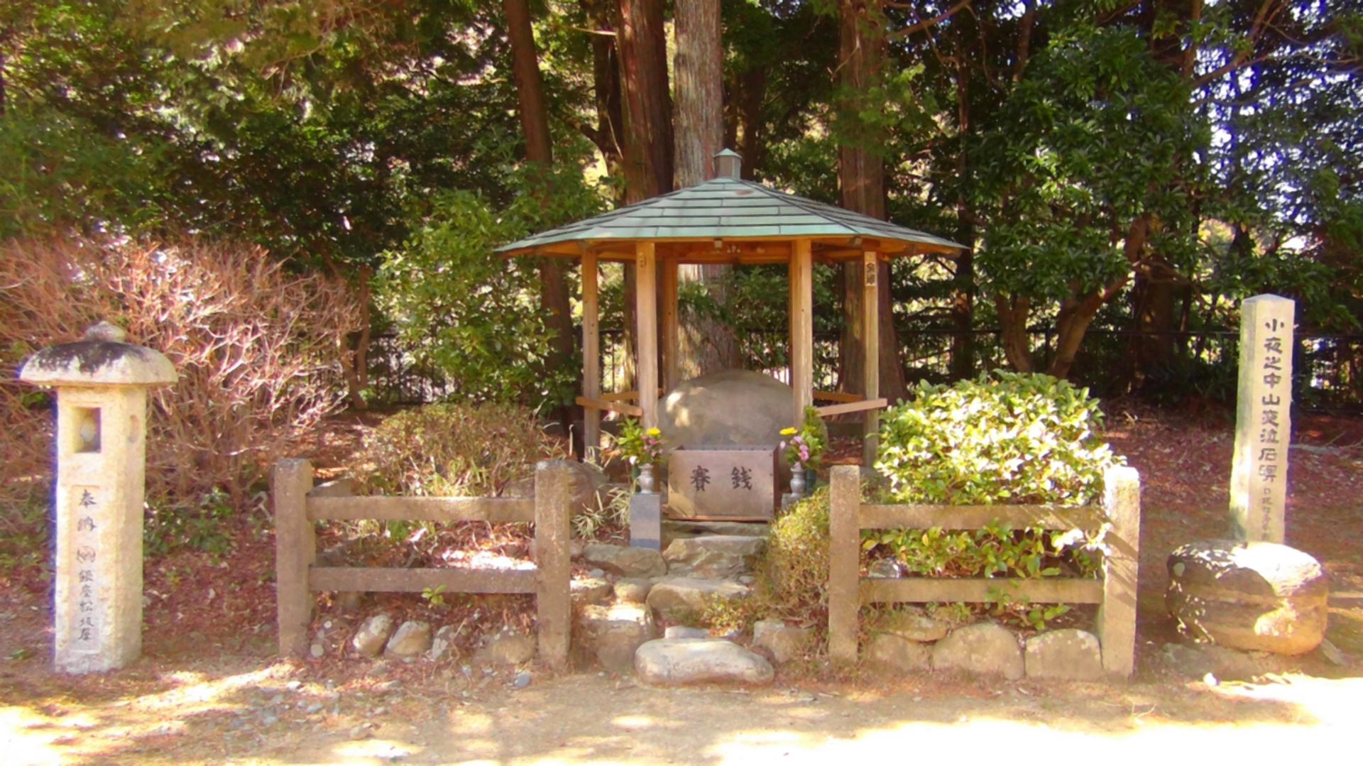 空港取付道路を掛川方面・国道473号バイパス方面に向かい、空港入口東交差点を右折。 国道473号線との交差点を越えて直進してしばらく走ると県道234号に出ます。角にホテルのある県道381号との交差点を左折して道なりです。 空港から車で約10分です。